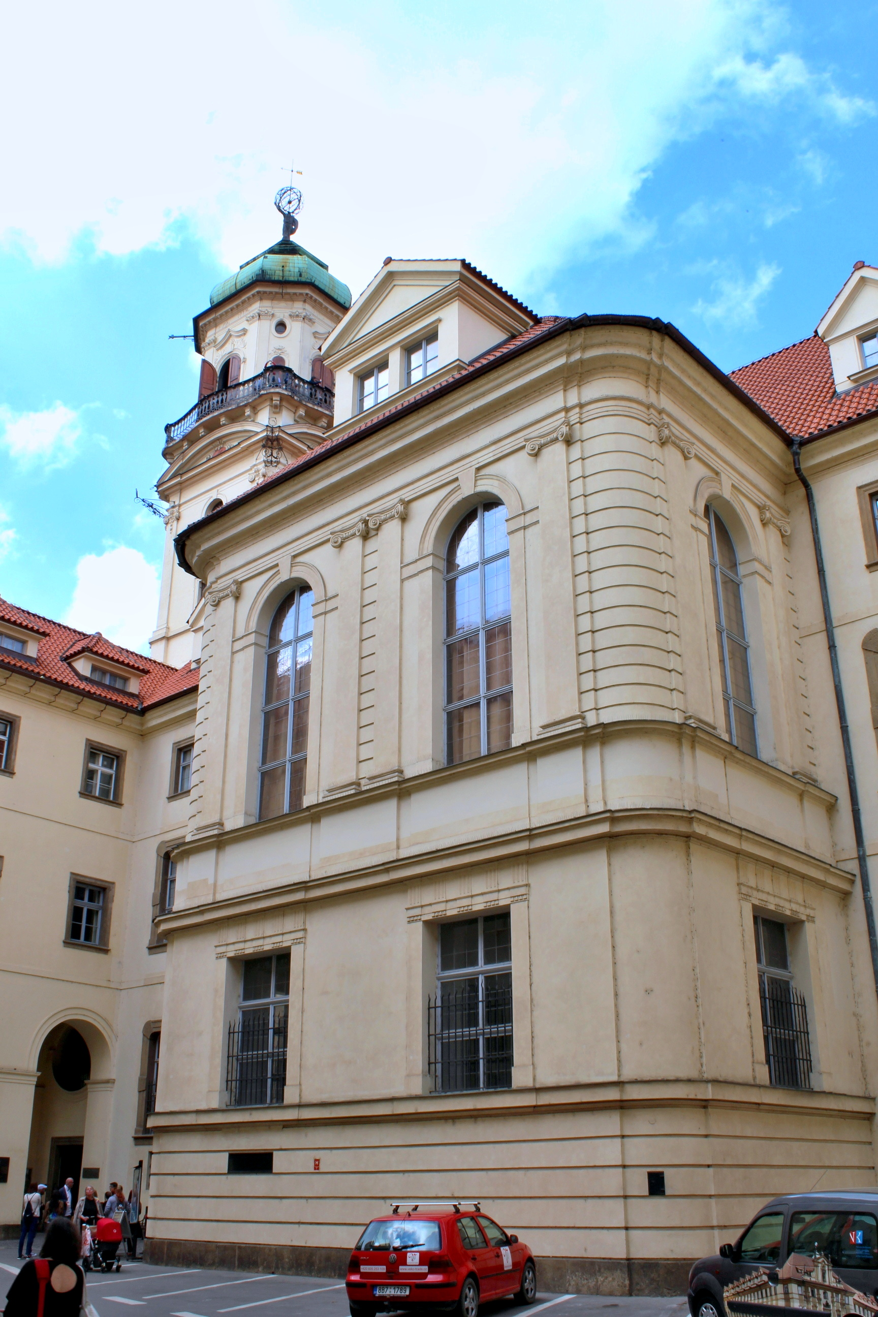 Klementinum, Zrcadlová kaple